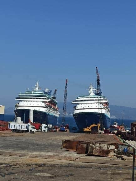 Monarch et Sovereign, en juillet 2020, à Aliaga en Turquie, pour être démantelés.